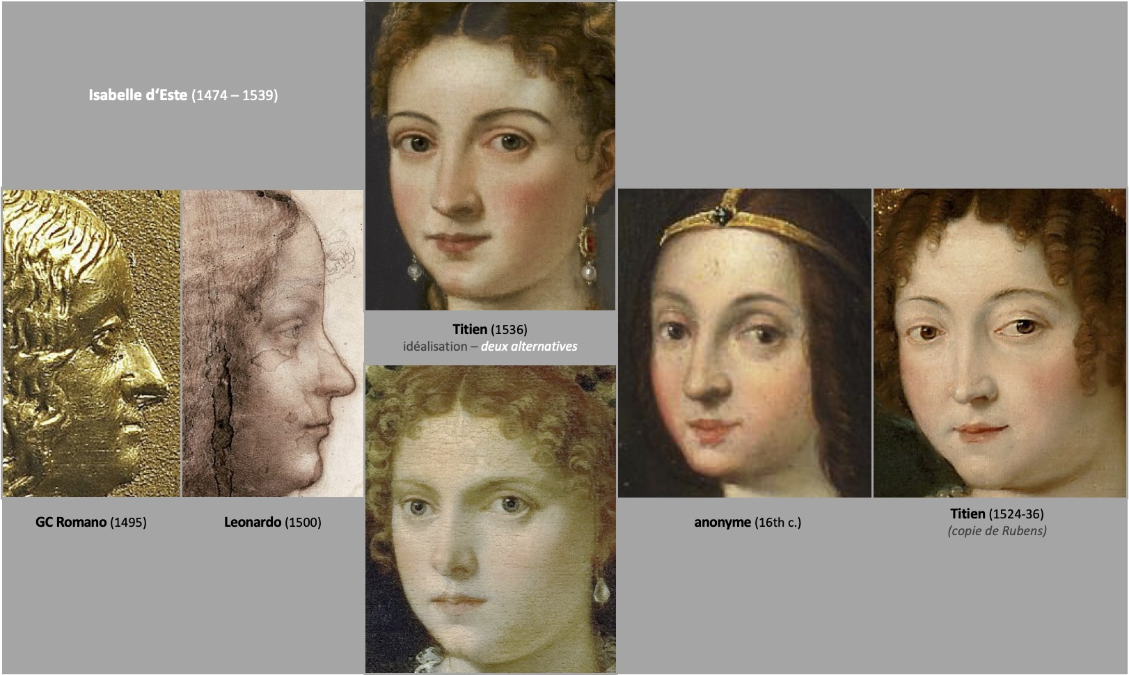 La personne d’Isabella d’Este en portraits (extraits de tableaux): Gian Cristoforo Romano – Médaille / Leonardo da Vinci – Dessin / Titien (connu par copie Peter Paul Rubens) – ‘Isabelle en rouge’ / Titien 1536 (rajeunissant) – ‚Isabelle en noir’ versus ‚La Bella’ / Inconnu – Ambras miniature